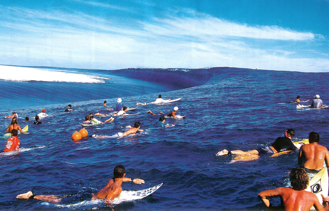 Spot de Teahupoo